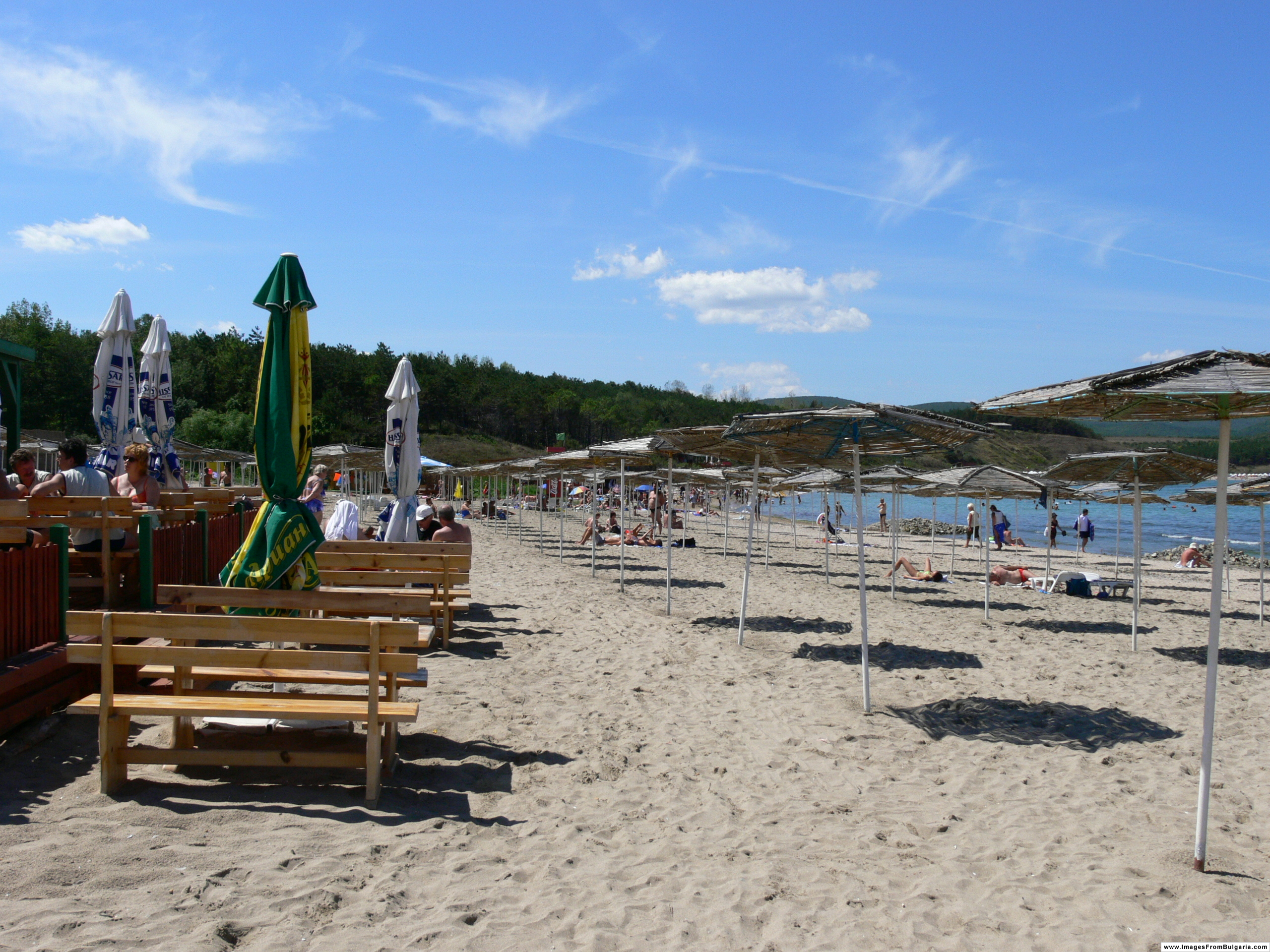 Ahtopol, Bulgaria. Author: Nenko Lazarov. Beach